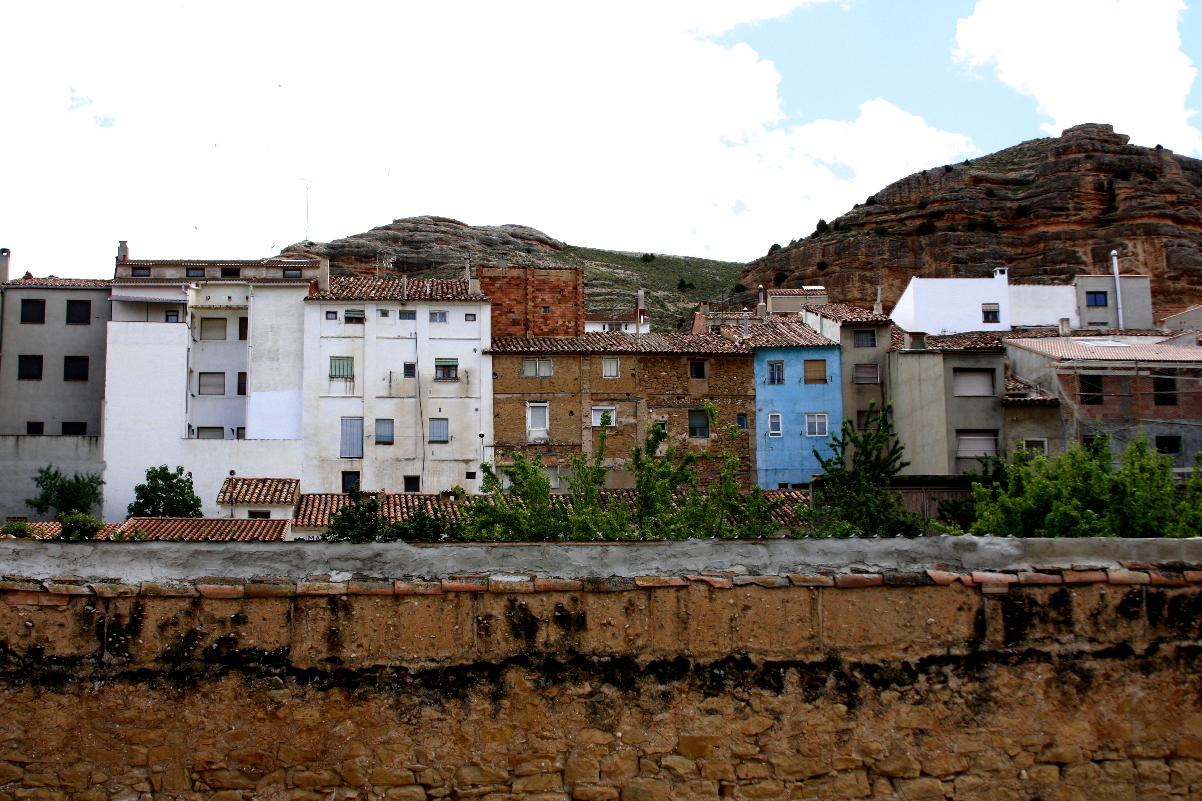 Alcorisa, Teruel, Aragón